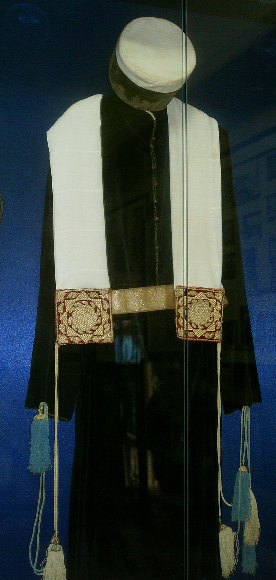 Облачение караимского священнослужителя - газзана